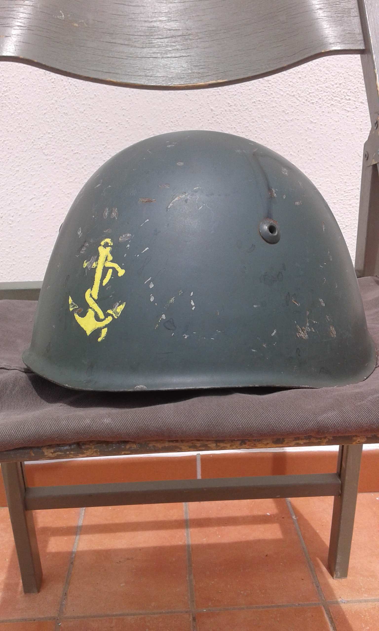 Elmetto postbellico della Marina. Da notare la livrea simile a quella bellica.